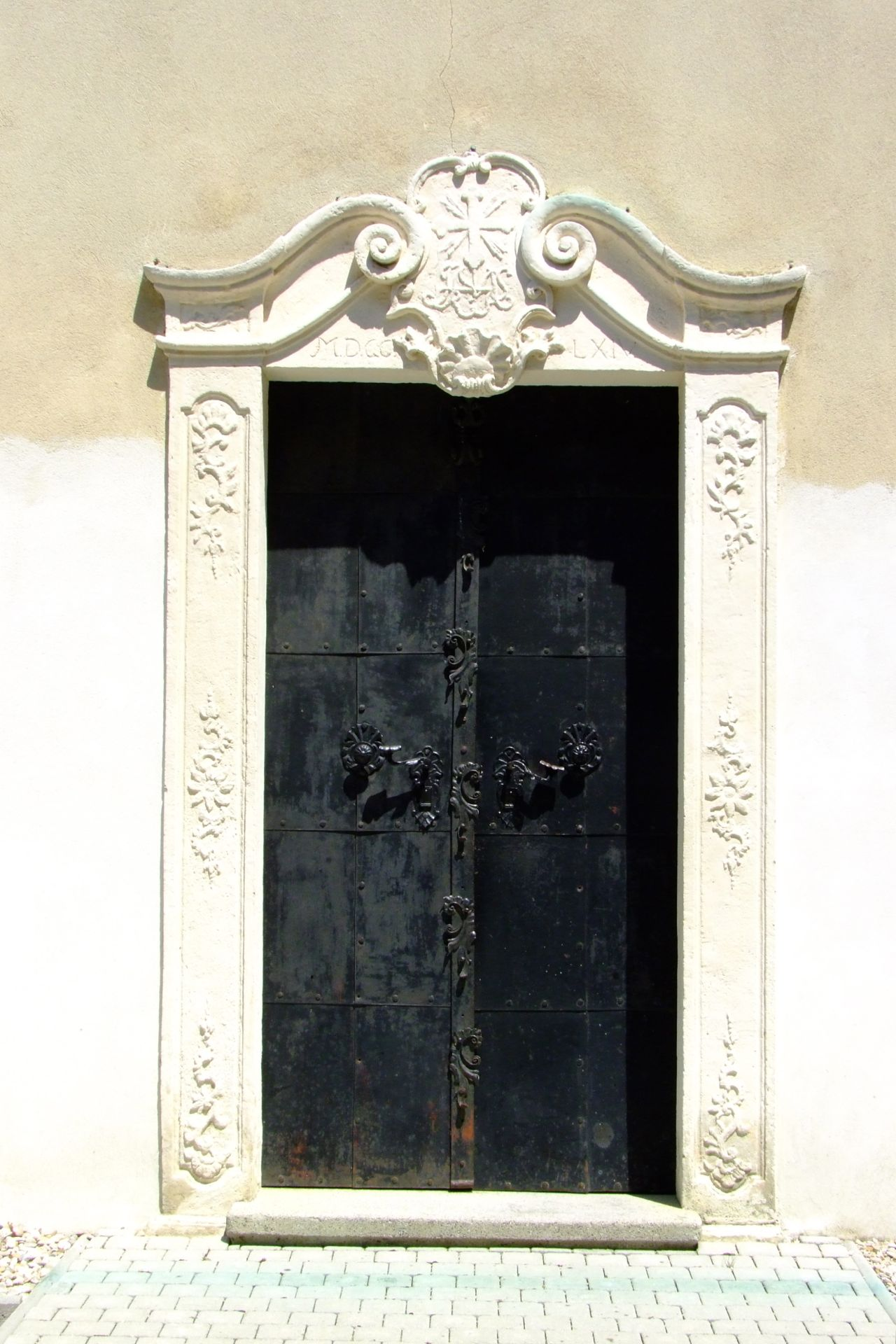 Kath. Pfarrkirche hl. Jakobus der Ältere